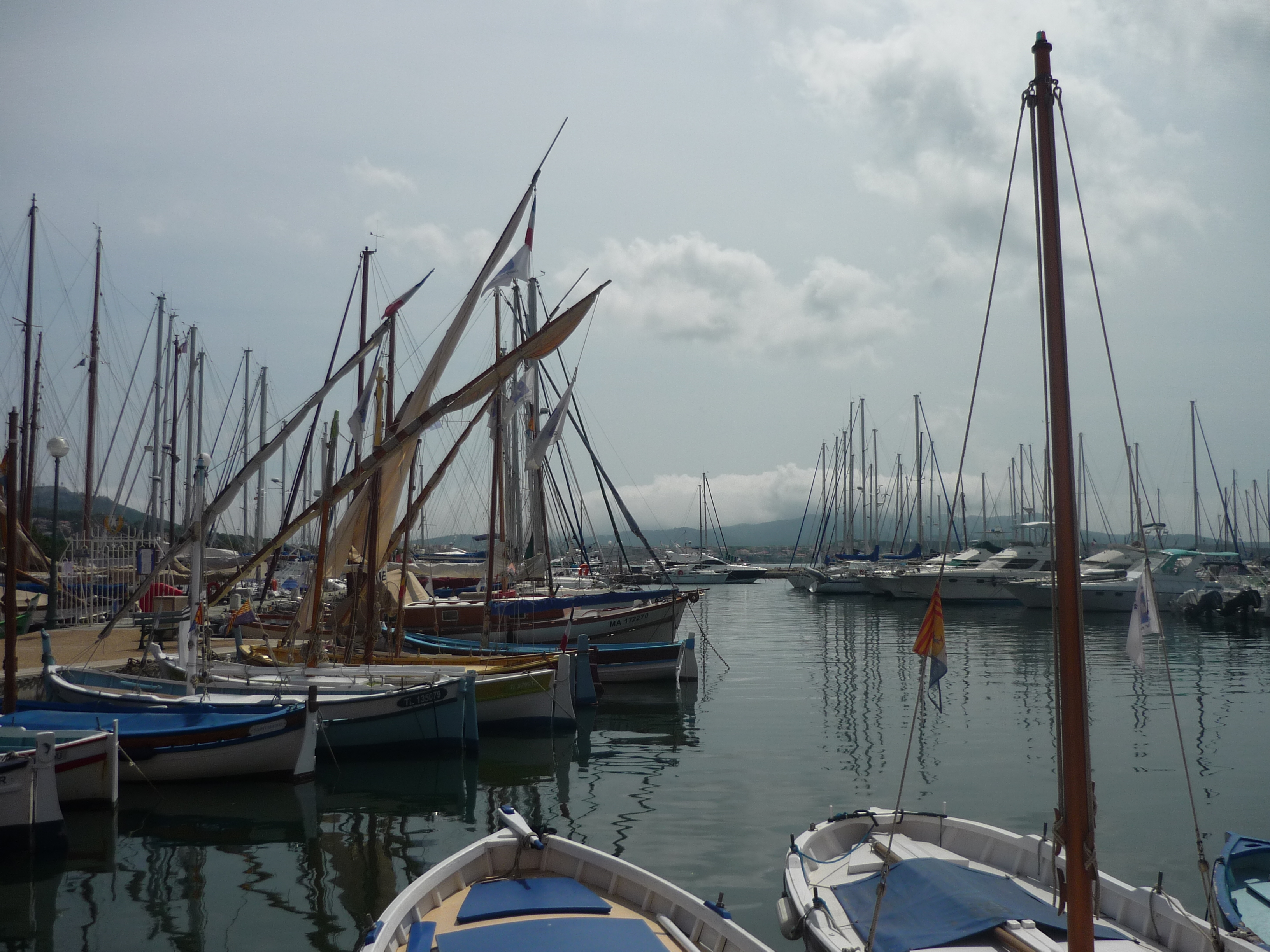 Vue du port de plaisance de Miramar sur le territoire de la commune de La Londe-les-Maures, Côte d'Azur, France.